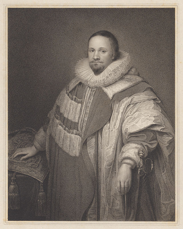 Engraving after Cornelis Janssens van Ceulen